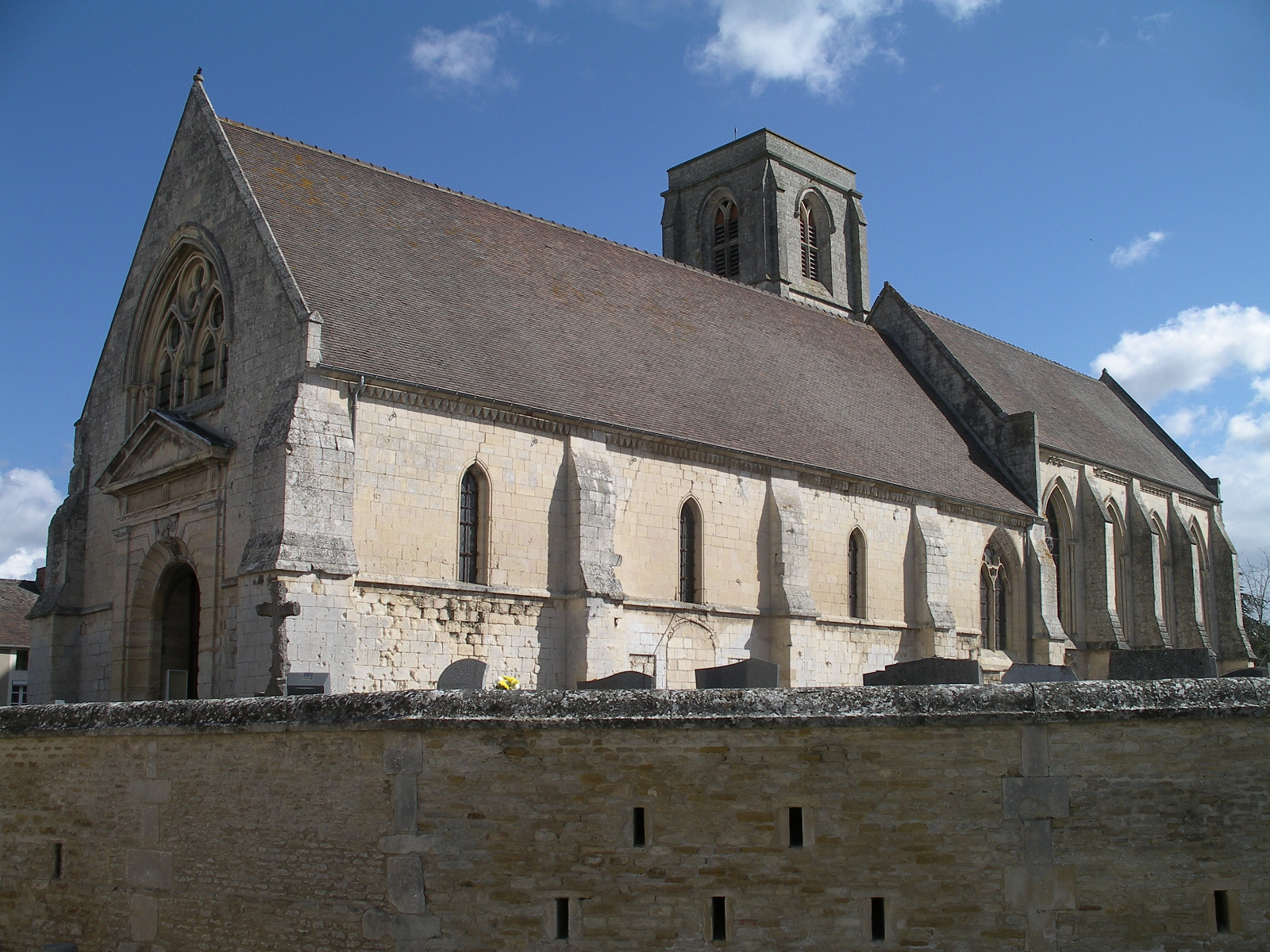 Eglise Notre-Dame à Démouville (Calvados)